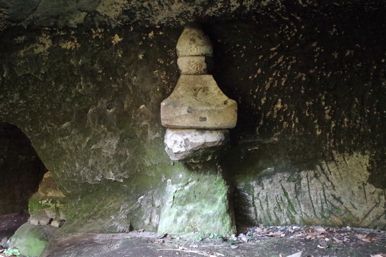 漆喰の残る五輪塔の掘出